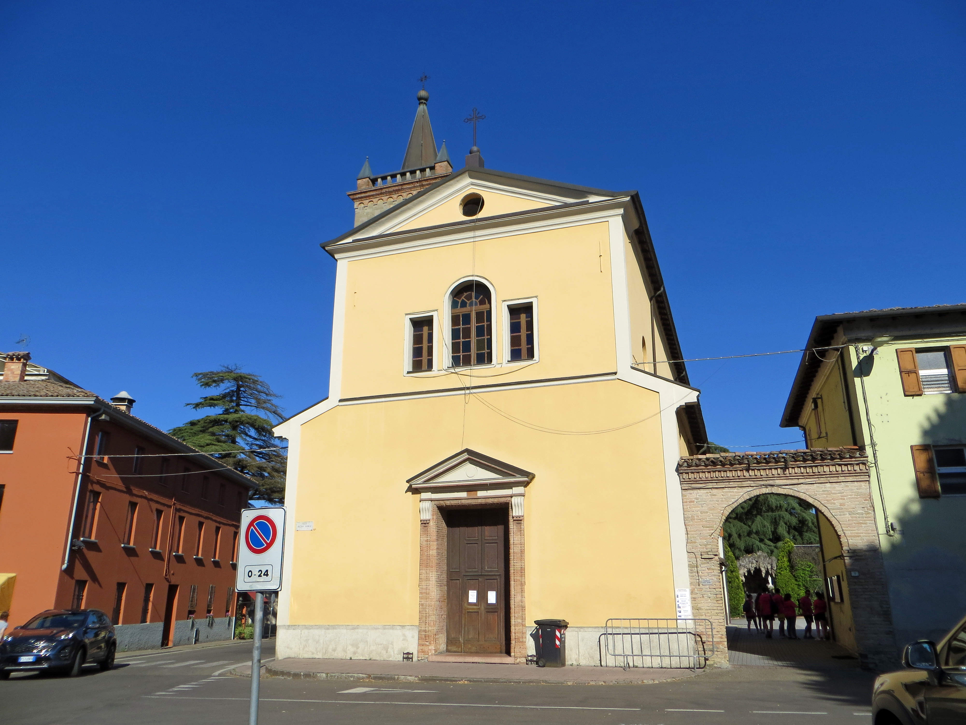 Chiesa della Purificazione della Beata Vergine Maria (Felino) - facciata